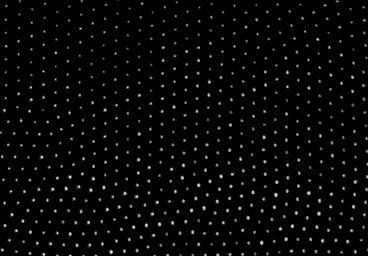 Aufsicht eines Plasmakristalls Summary Ansicht einer Kristallebene eines Plasmakristalls / Quelle: MPE Garching Das Bild stammt von und wurde mit Einverständnis der Besitzer veröffentlicht. Bitte um Mitteilung bei Verwendung anderswo.